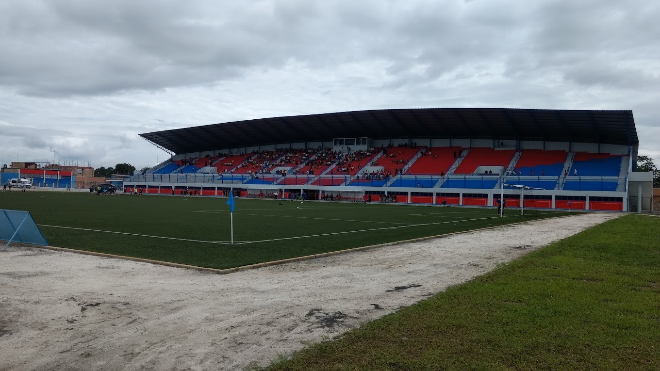 Estadios del Peru